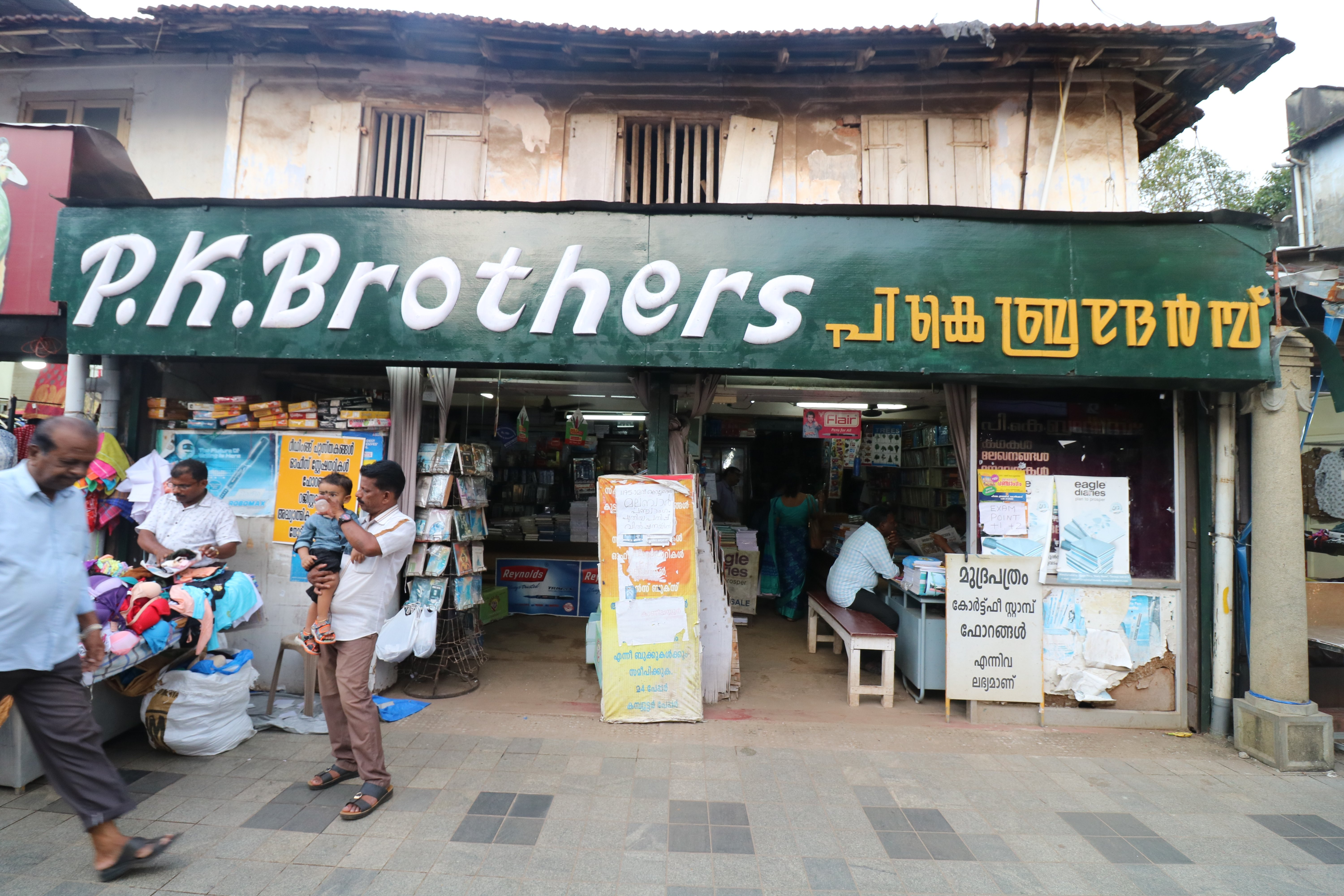 കോഴിക്കോട് മിഠായിത്തെരുവിലെ പി.കെ. ബ്രദേഴ്സ് ബുക്ക് സ്റ്റാൾ